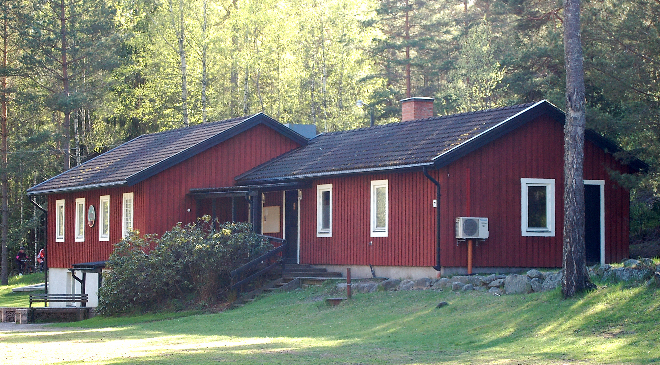 Tyrstugan, Karlstad.